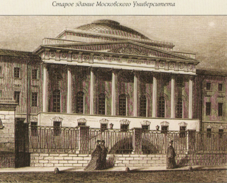 Moscow University in the 19 st century Московский университет в 19 веке